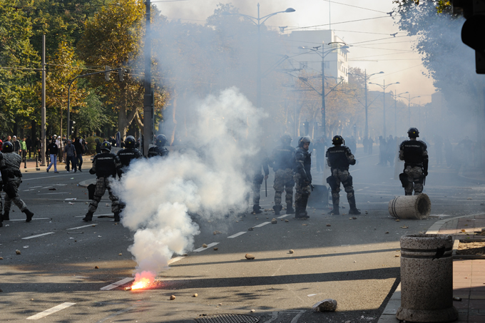 Foto: Wolfgang Klotz / Heinrich-Böll-Stiftung